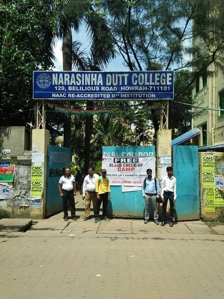 নরসিংহ দত্ত কলেজের সম্মুখভাগ